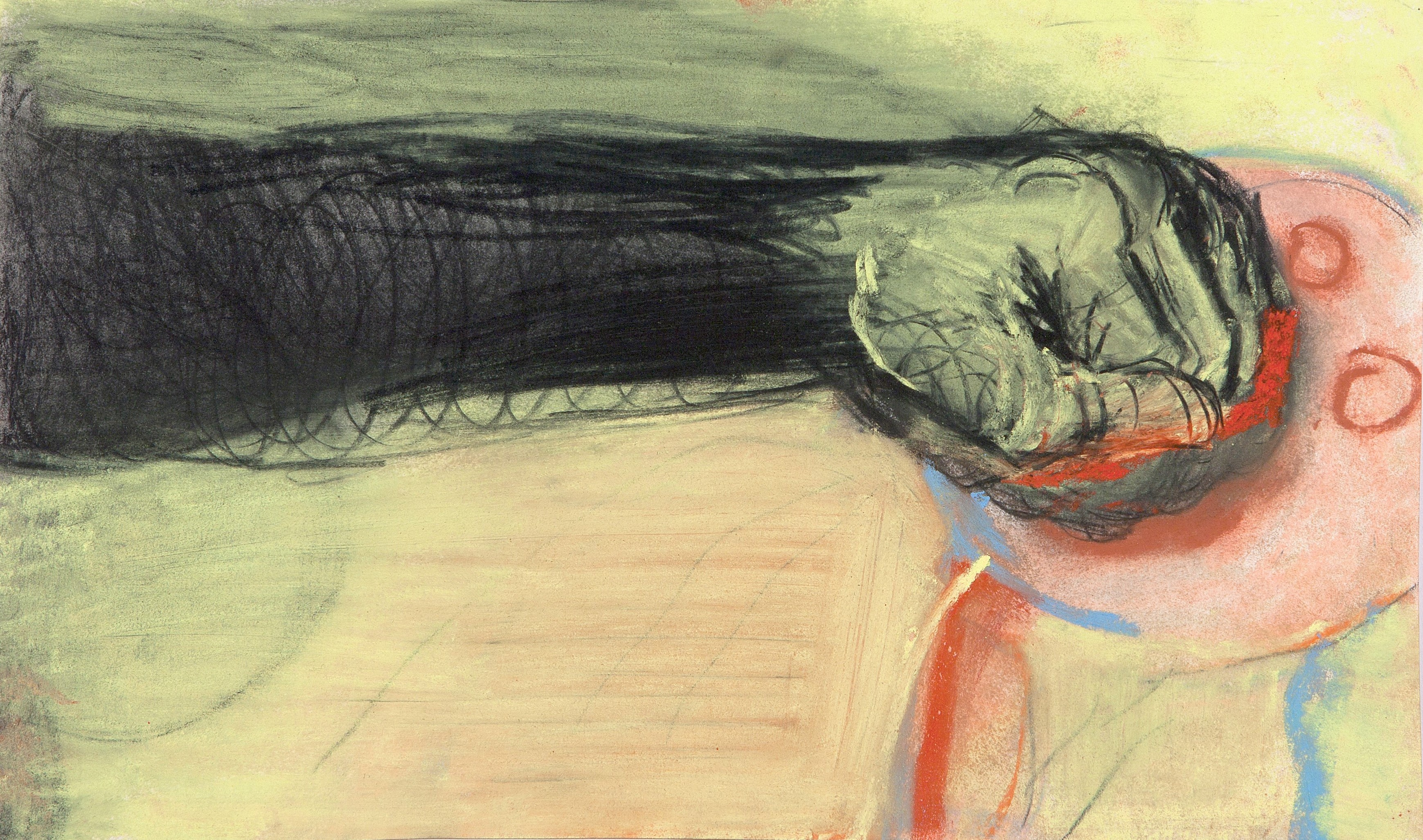 Grupa prac na papierze Miriam Cahn to rozwinięcie dla wielkoformatowego, niezwykle malarskiego obrazu Mała rodzinka znajdującego się w kolekcji Muzeum. Tam, niepokojący i oniryczny portret rodziny przedstawiał trzy postaci o rozmytym konturze, sprymitywizowanych rysach twarzy i przerysowanych, wręcz groteskowych częściach intymnych, tworząc pole napięć o nieokreślonych wektorach. Tu, niewielkie formatowo prace na papierze niosą podobny ładunek intensywności. Z jednej strony to patrzące z kadru dygoczące (marionetkowe, a jednocześnie w ich bezbronności przejmująco obecne) postaci poddające się oprawcom kontrastującym z ich rozedrganym konturem – ciemnym i rysowanym zdecydowaną kreską. Z drugiej, to akwarele należące do większej serii przedstawień opresyjnej architektury i pojazdów wojennych (czołgów, różnej maści pistoletów czy karabinów) będących echem dla ludzkich – tak twórczych, co destrukcyjnych – pasji.